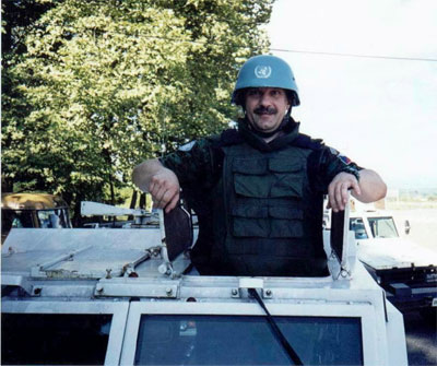 pplk. Ing. Jaroslav Kulíšek znovu nasazen v roce 1998 v Gruzii do pozorovatelské mise OSN UNOMIG